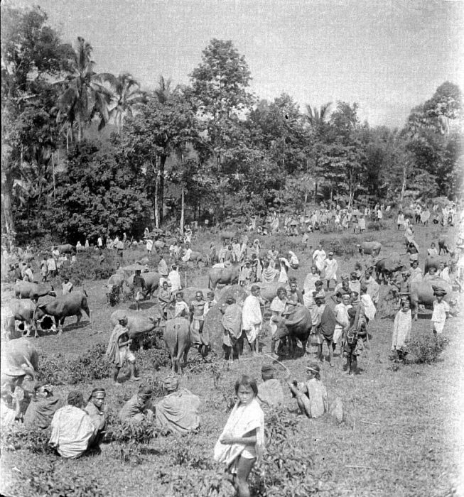 Negatief. Dodenfeest in Toraja, Celebes